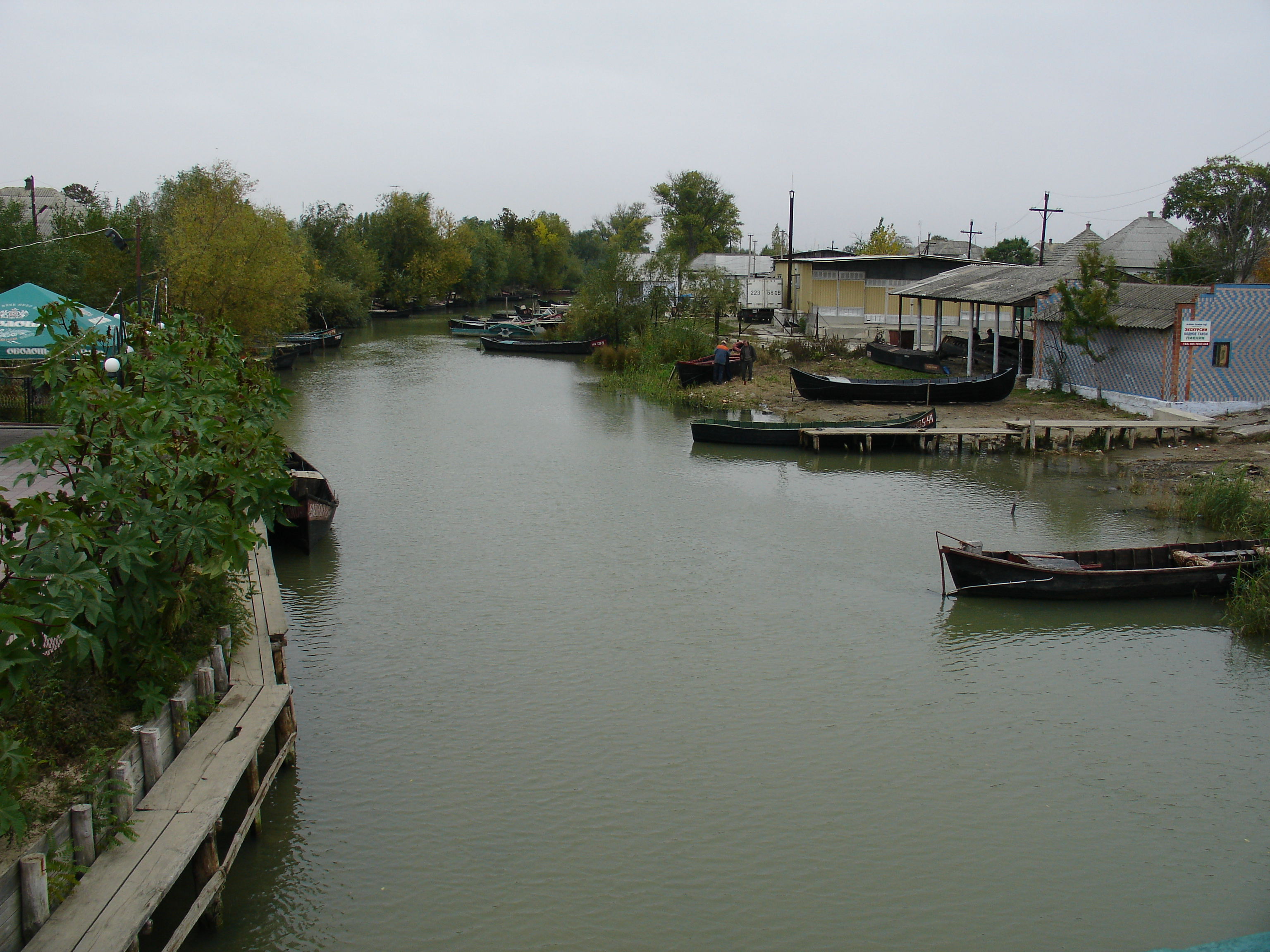 місто Вилкове (Одеська область)